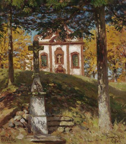 Kath. Kreuzkapelle Hülchrath, Blankenheim in der Eifel. Öl auf Leinwand, 45,5 x 38,5 cm. Signiert und datiert »F. v. Wille 1904«, betitelt »Blankenheim Eifel«